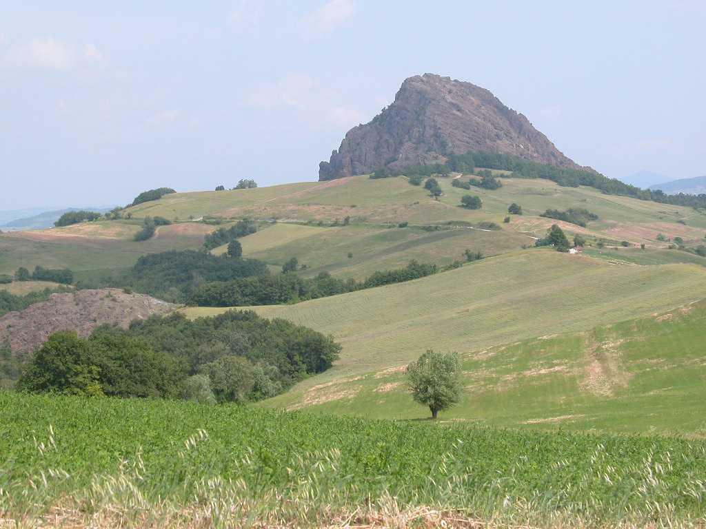 foto mi personale, la Pietra Parcellara, in comune di Travo e Bobbio (PC), 2007